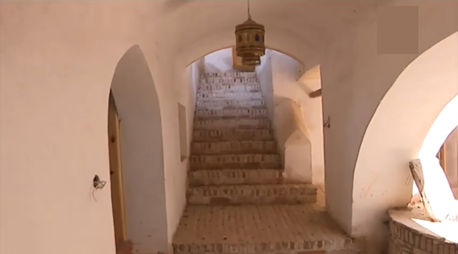 Mosquée Djamâa Aâdham de la Casbah de Béjaïa مسجد الجامع الأعظم في قصبة بجاية